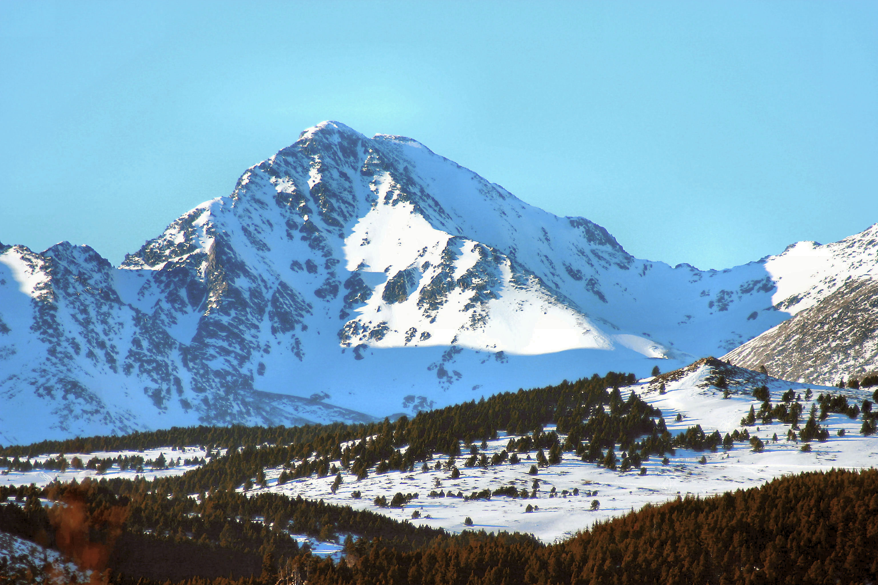 Vue depuis les Bouillouses